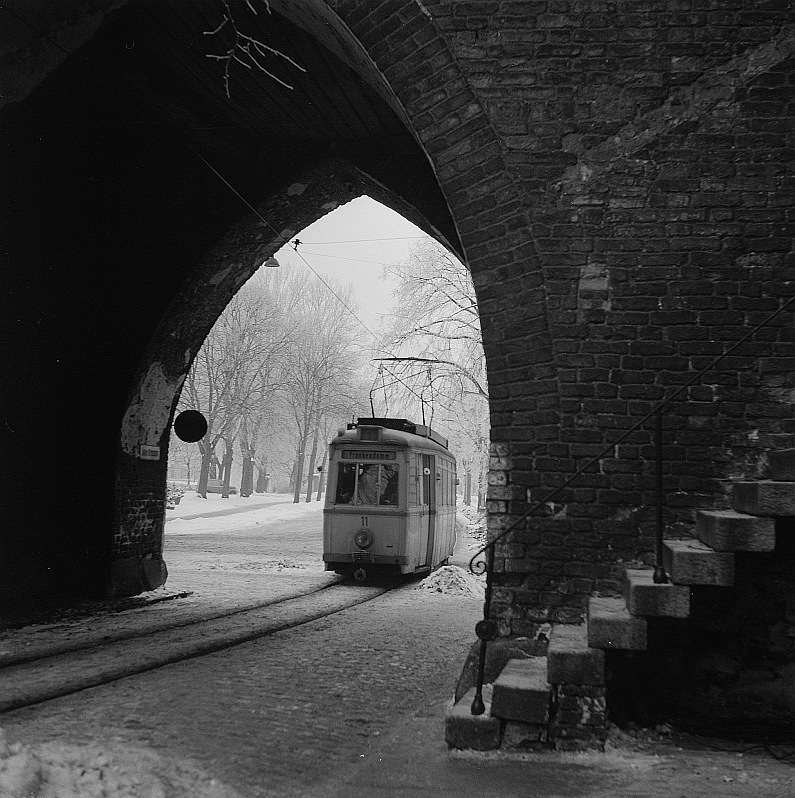 Original image description from the Deutsche FotothekStralsund. Kniepertor, Ansicht stadtauswärts, Ansicht durch den Torbogen mit Straßenbahn